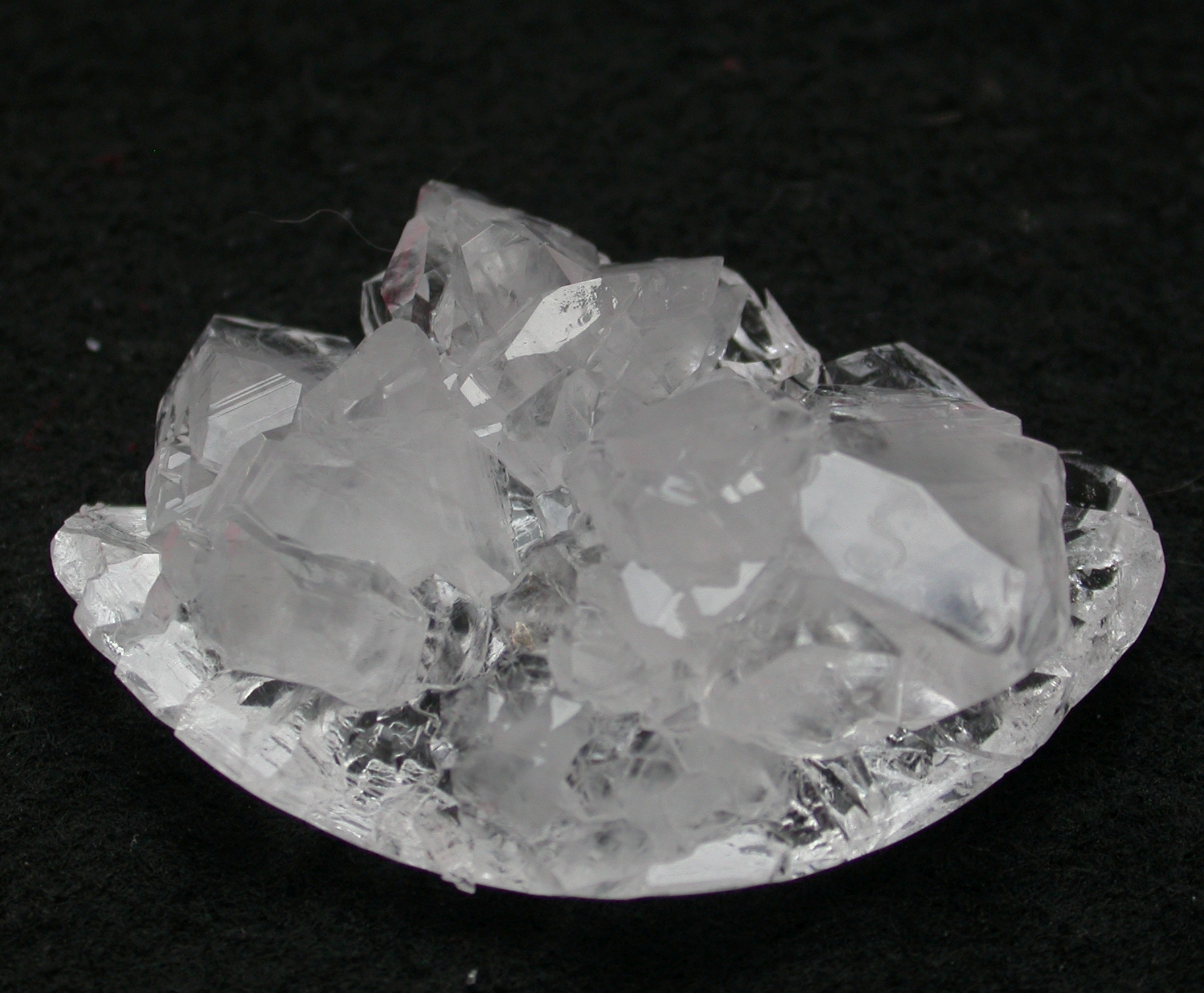 Kristallzucht aus gesättigter Zitronensäurelösung.